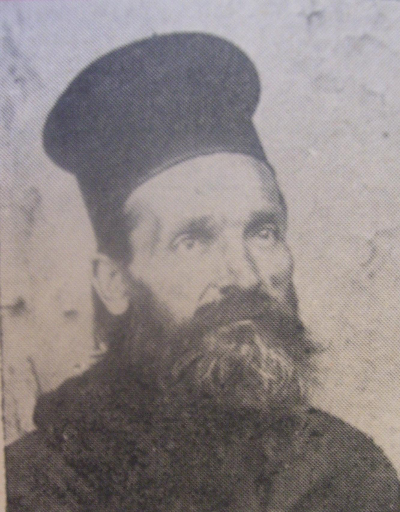 Деецът на ВМОРО Стоян Гюрчинов.